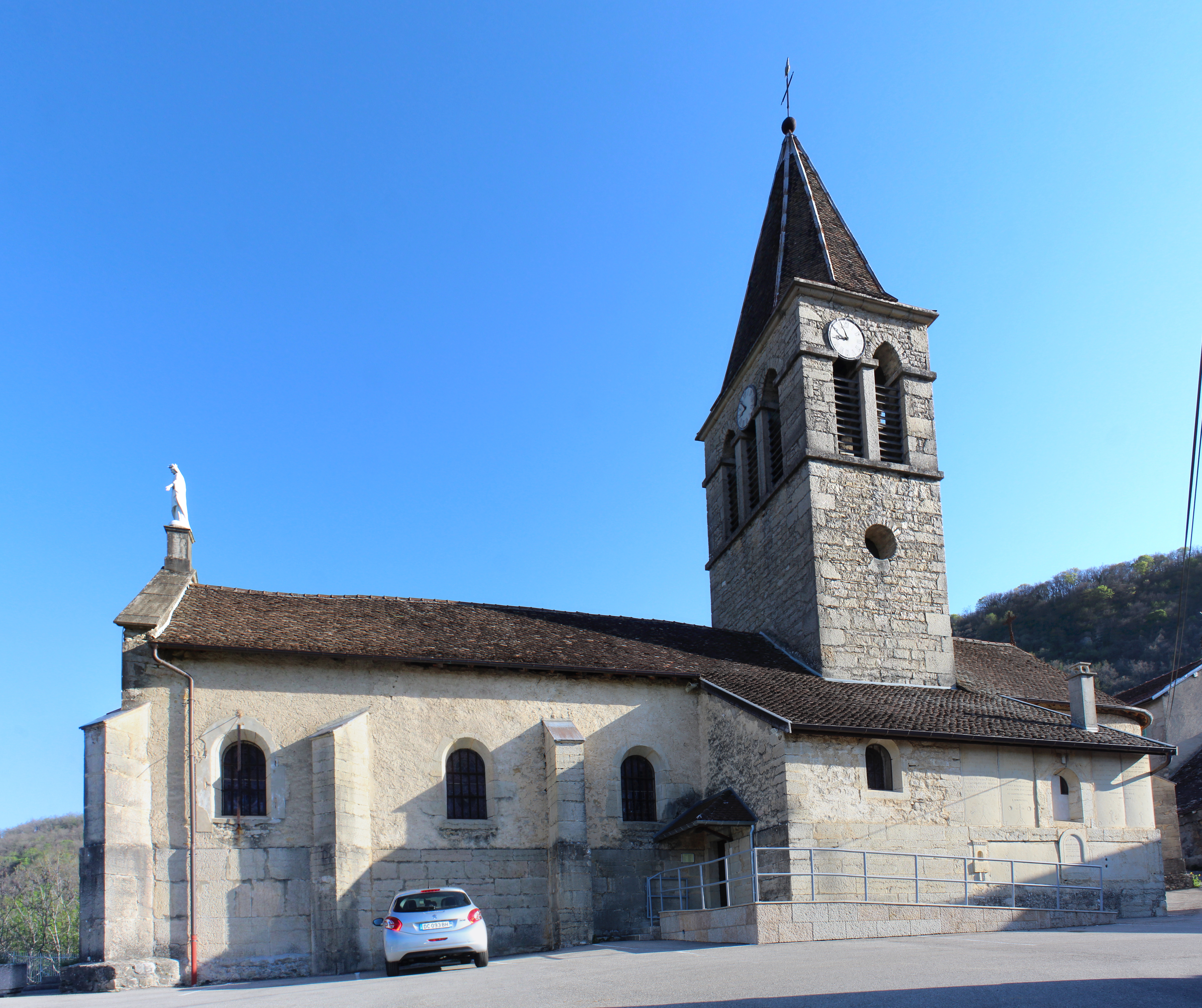 Église Saint-Pierre de Bénonces.